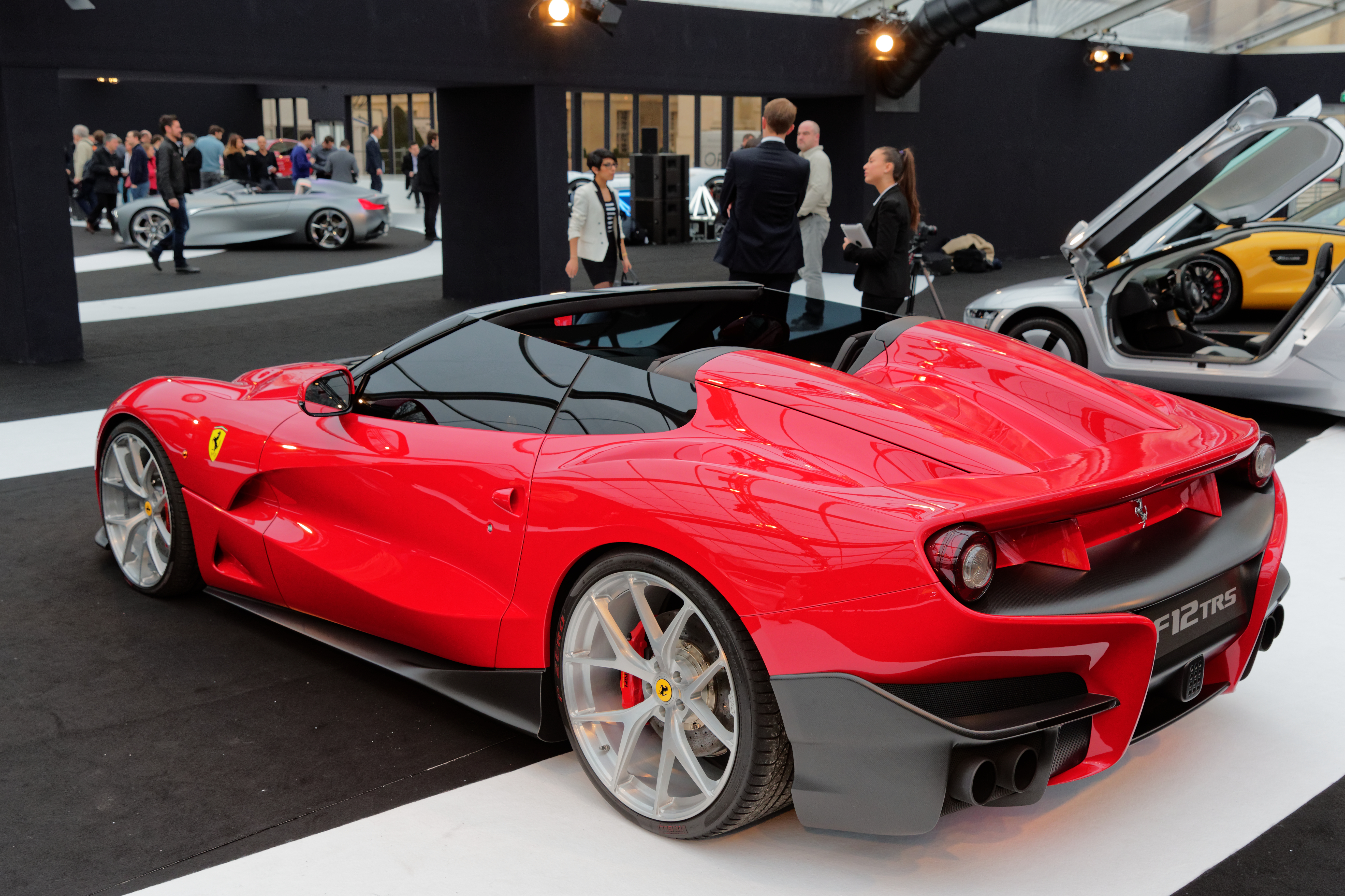 La Ferrari F12 TRS exposée lors du festival automobile international 2015.